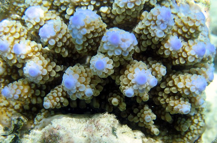 Acropora nasuta (Hexacorallia, Acroporidae)